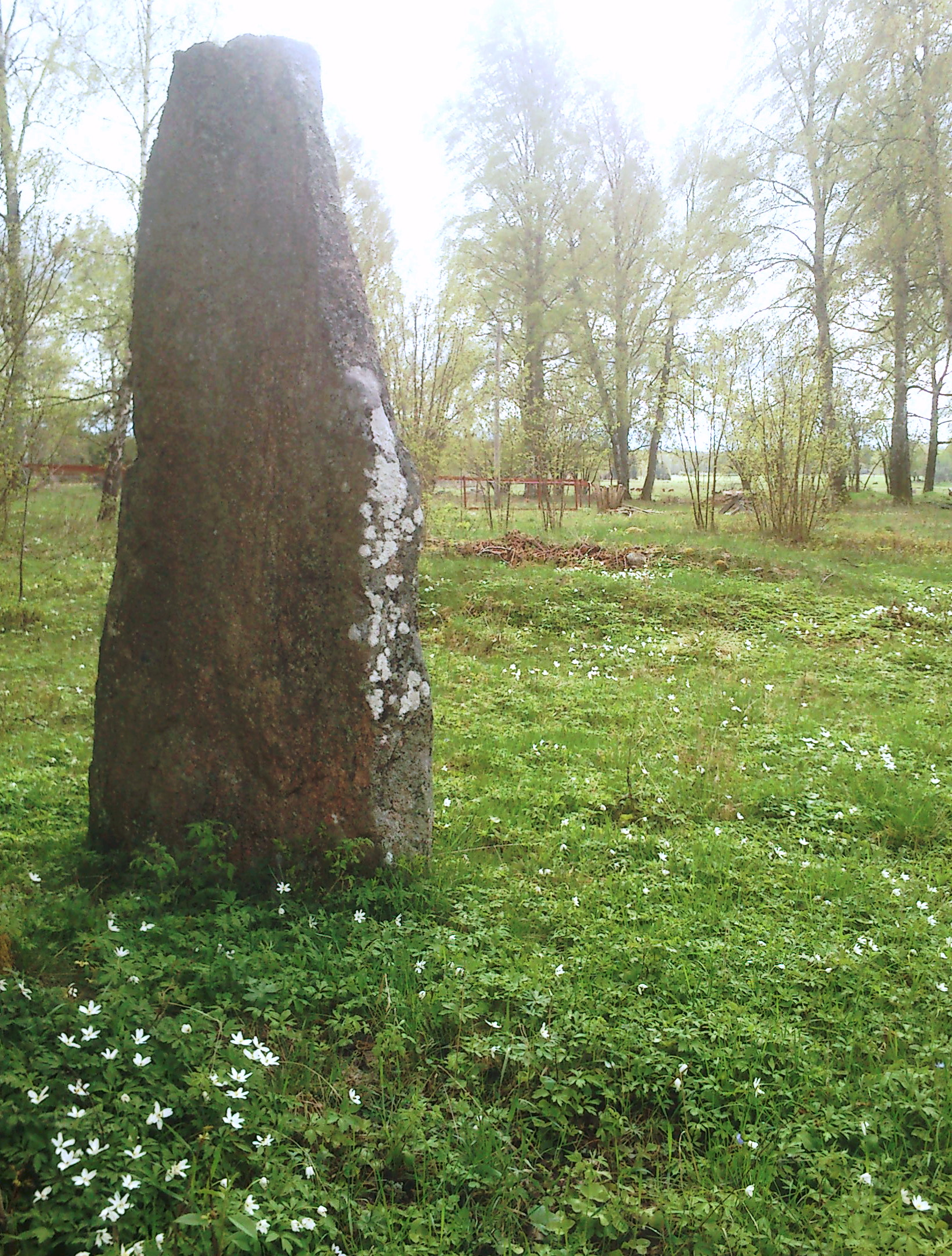 Glottrastenen är Närkes största bautasten. Den ligger lättillgänglig längs med Glottra byväg 100 m från riksväg 51 mellan Örebro och Norrköping. Glottrastenen restes troligen under brons- eller järnåldern. I nära anslutning till stenen ligger ett gravfält med flertalet stenrösen från samma period. Några kilometer från Glottrastenen ligger Svenders sten, en något mindre bautasten. Glottrastenen sägs enligt sägnen vara rest efter drottning Glottra, medan Svenders sten restes efter kung Svender.